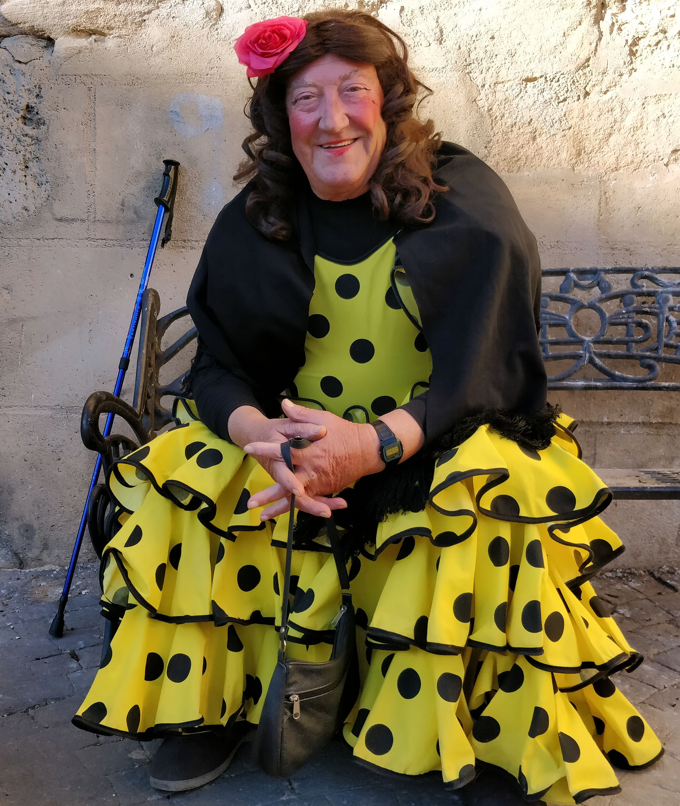 Abraham 2019